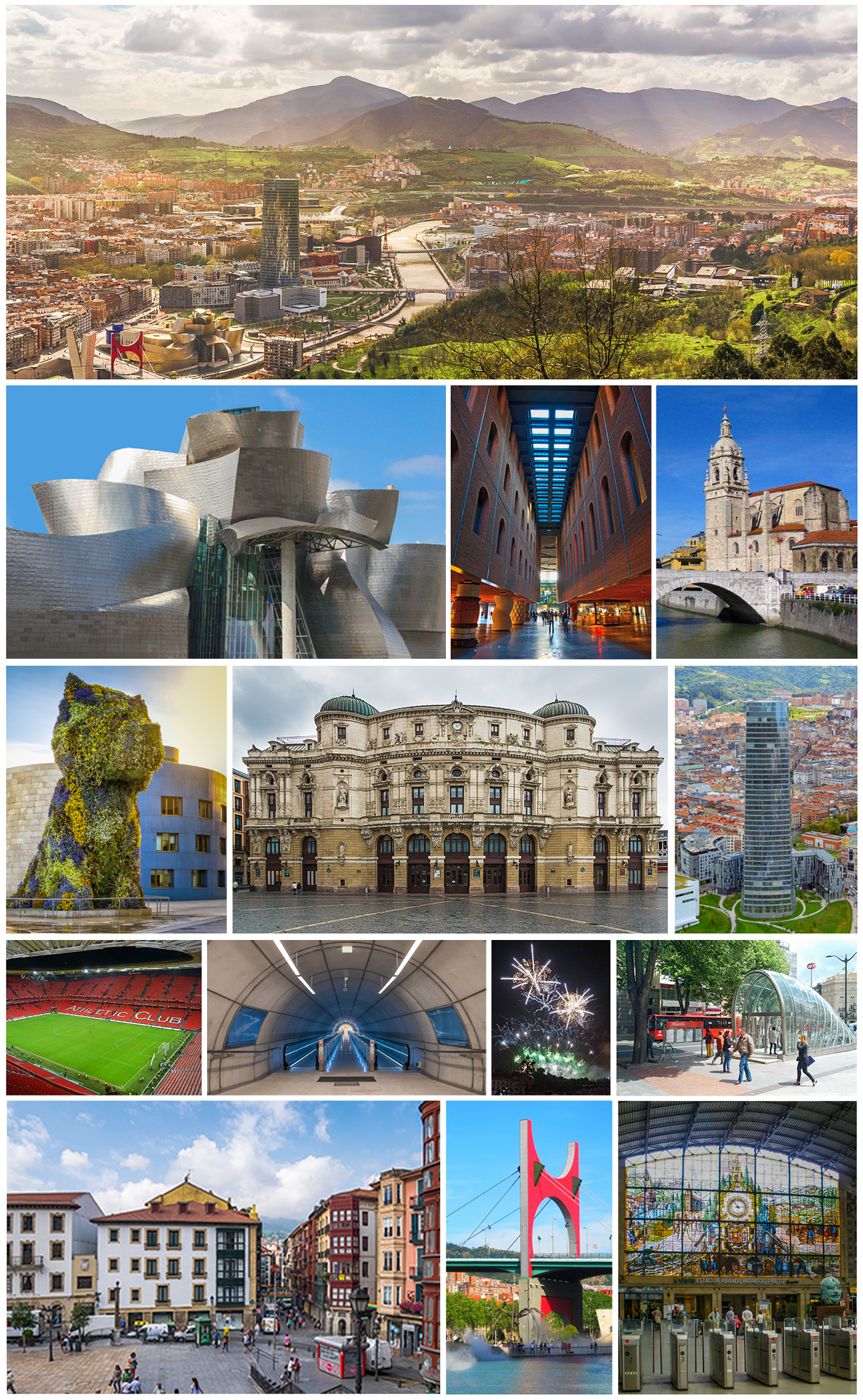 Fotografías representativas de la ciudad de Bilbao